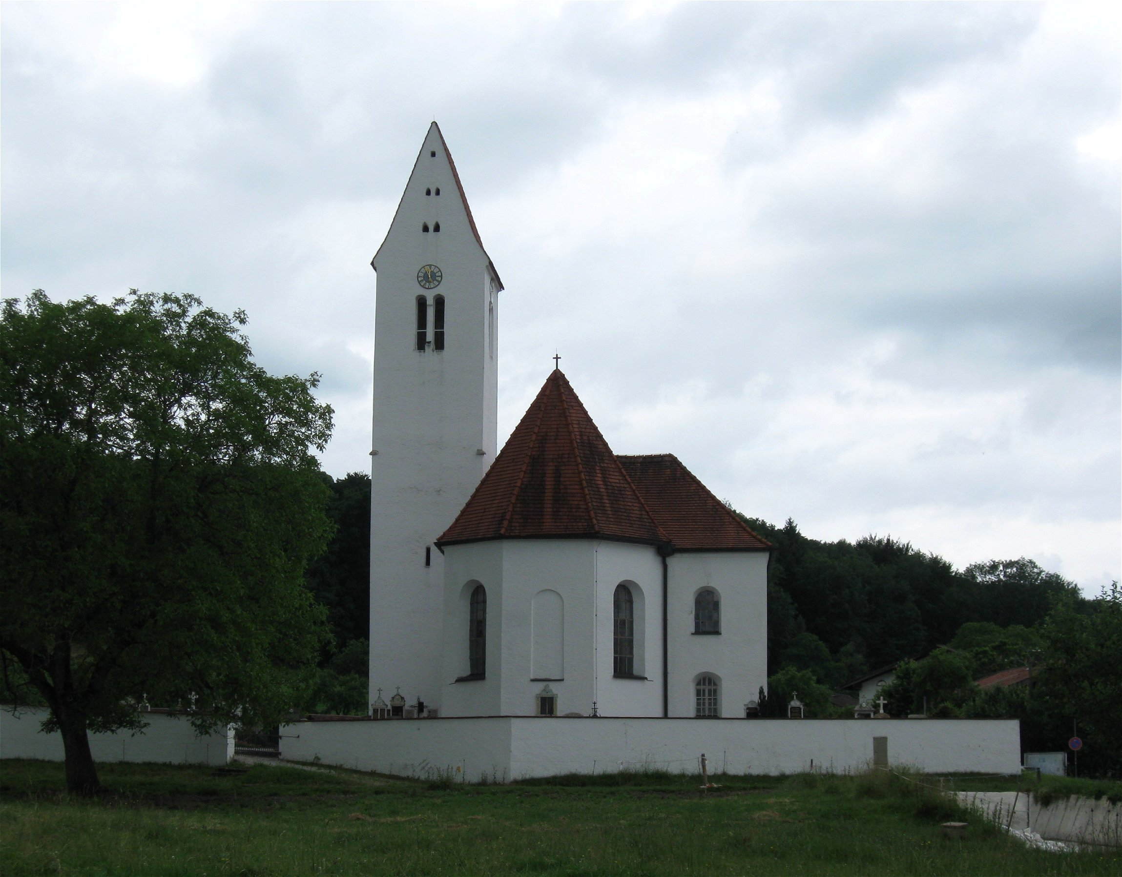 Kematen, Filialkirche St. Martin; im Kern mittelalterlich, Ausbau im 18. Jh. und 1814